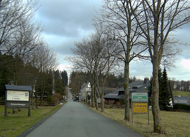 Schanze (Schmallenberg), Germany.